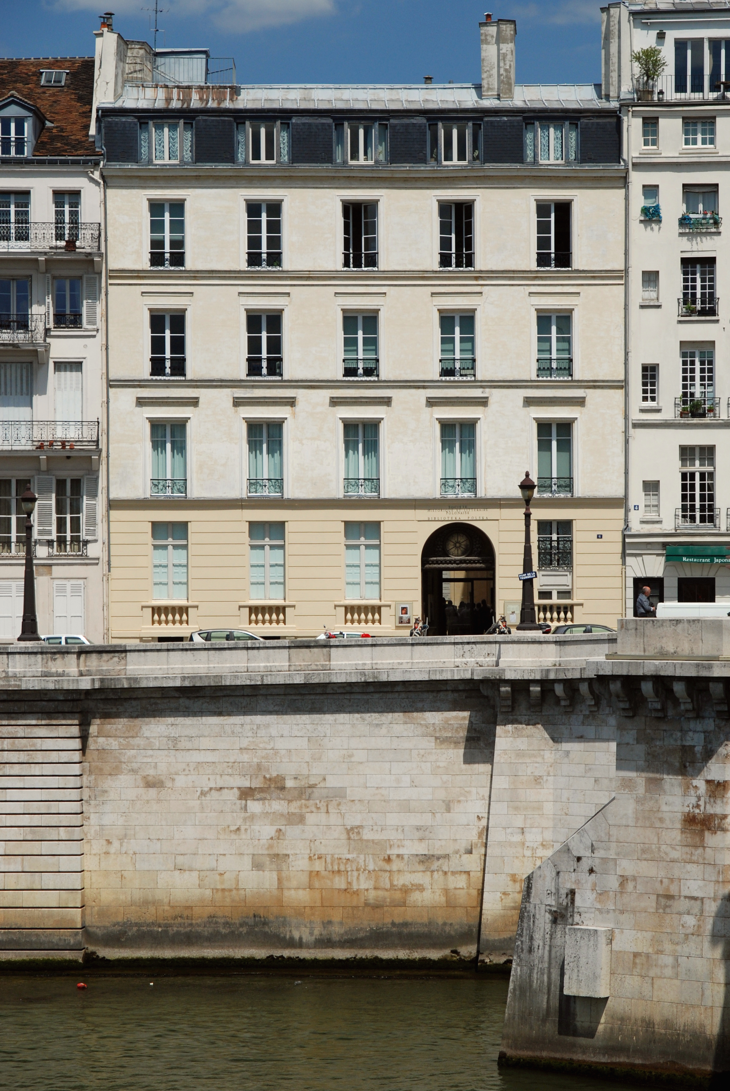 Biblioteka Polska w Paryżu. Quai d'Orléans, Paryż